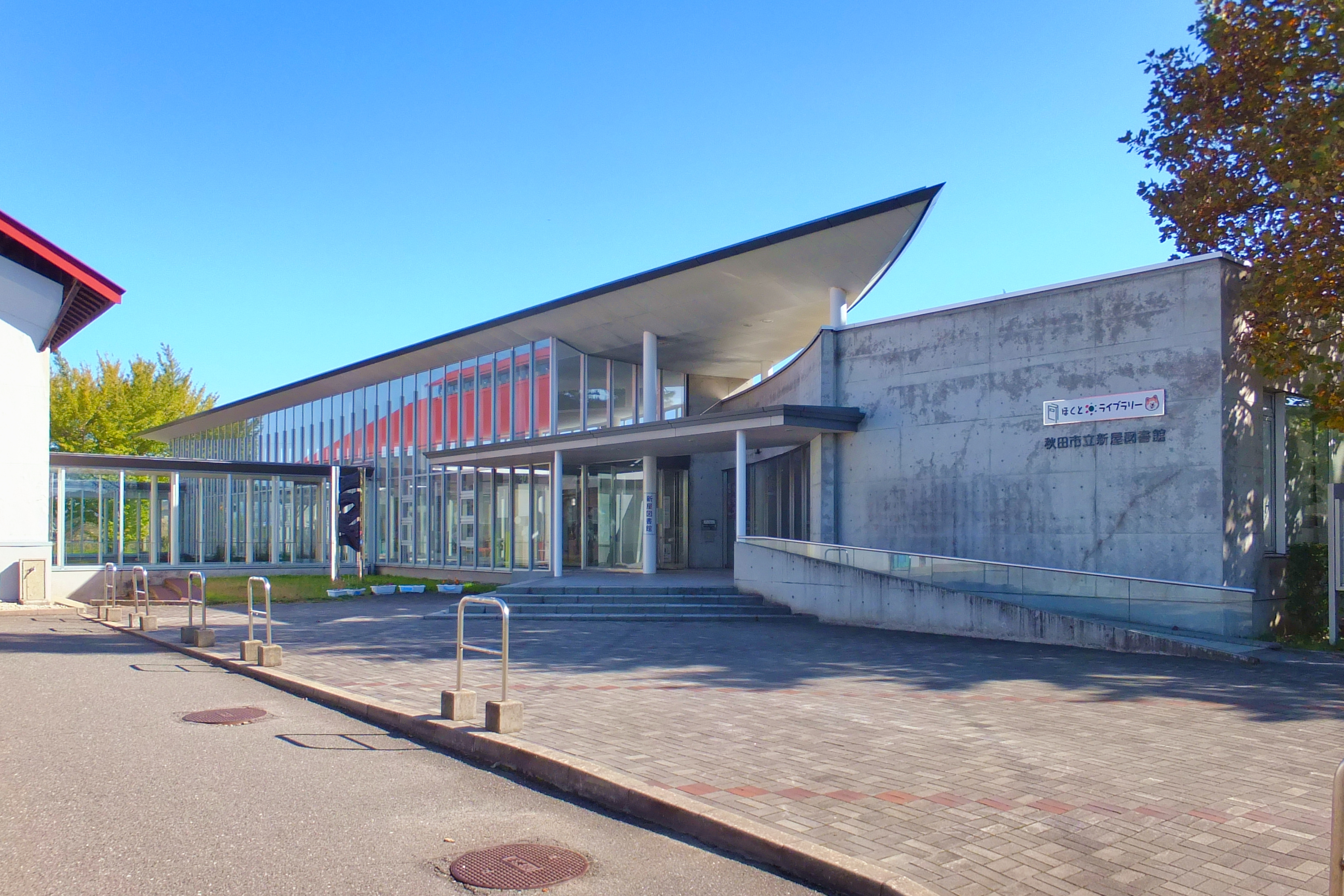 秋田市立新屋図書館。2015年に北都銀行が命名権を取得し、秋田市立図書館全館に「ほくとライブラリー」の冠がつく。1998年竣工、グッドデザイン賞受賞。